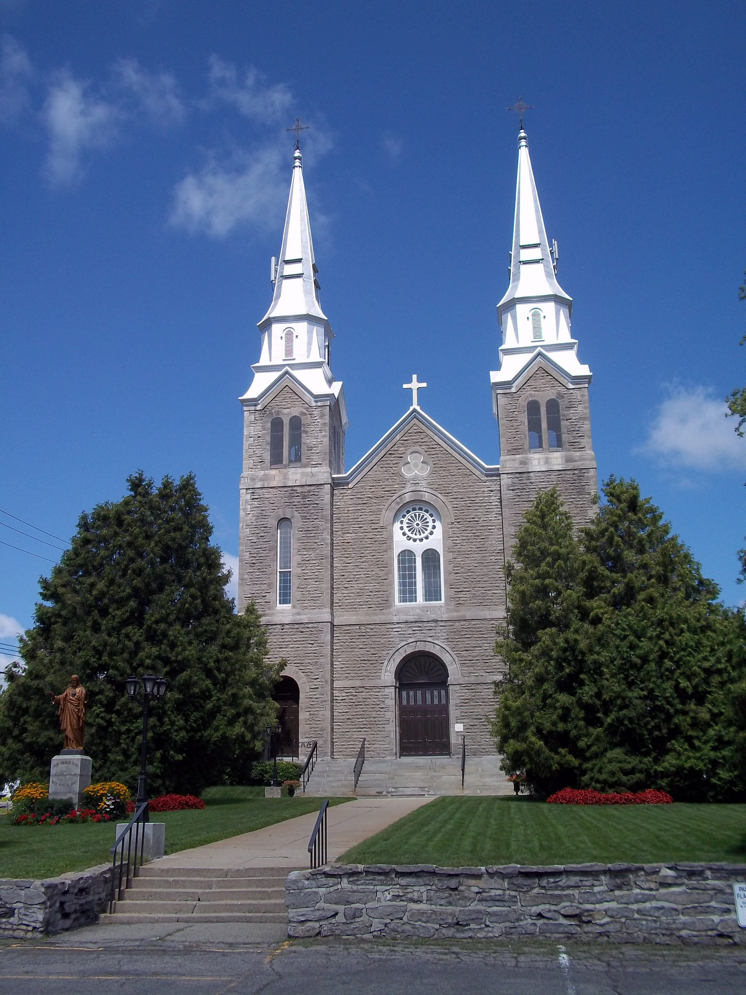 Église Saint-Raphael-Archange, 495, rue Cherrier, île Bizard. info